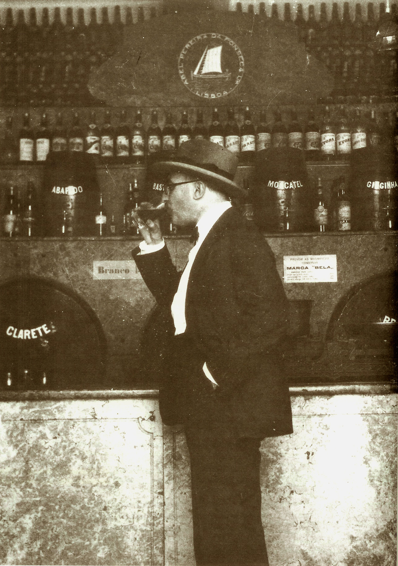 1929 - no Abel Pereira da Fonseca